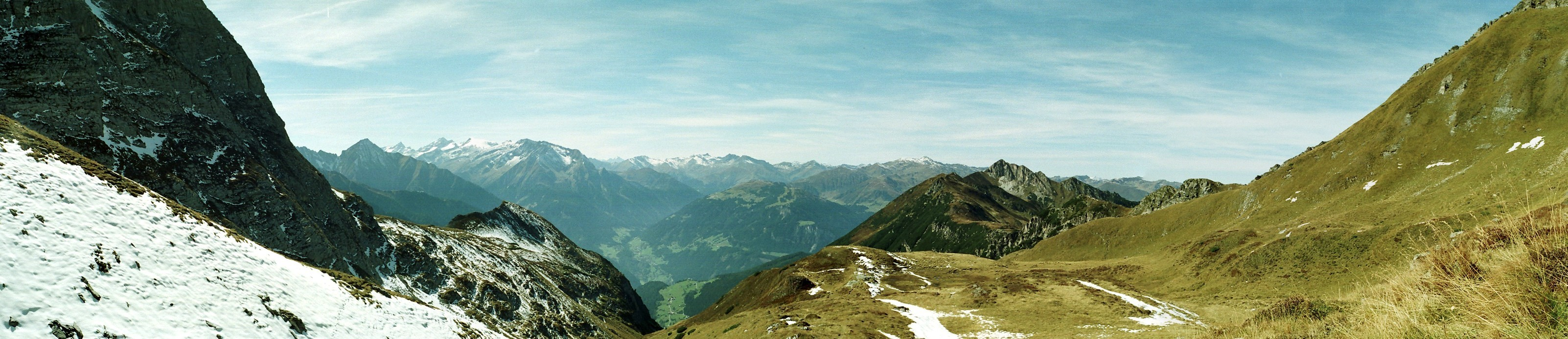 Das Brandberger Joch in den Zillertaler Alpen